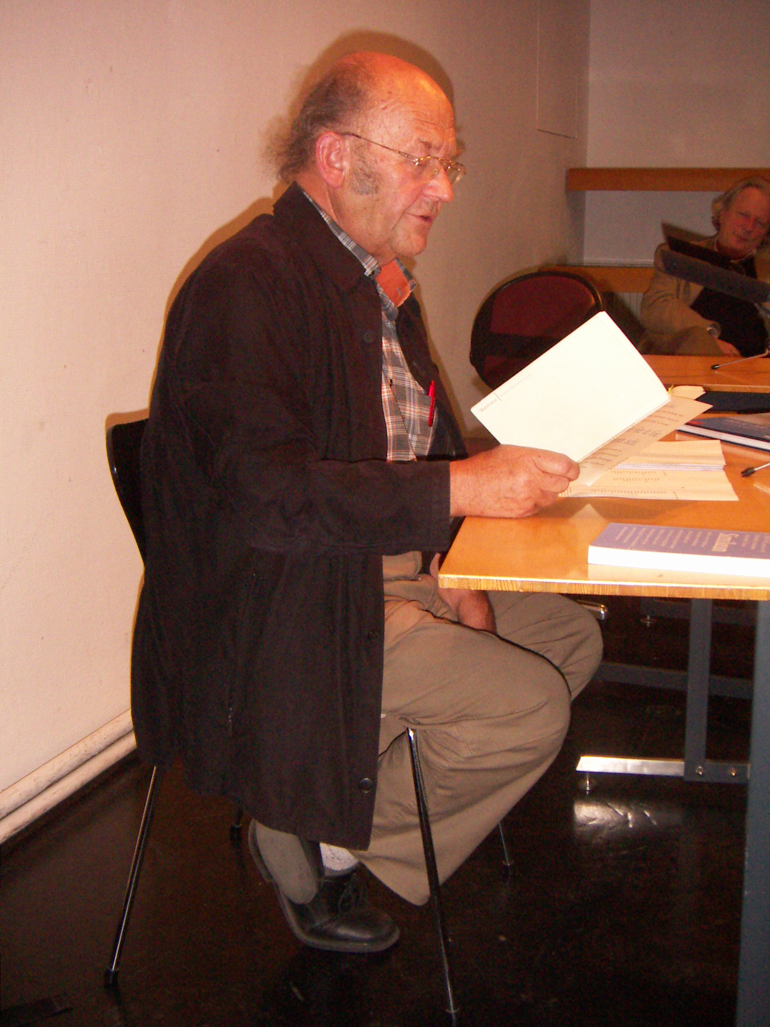 Hans Haid liest SIMILAUN in: Alte Schmiede - Literarisches Quartier, Wien